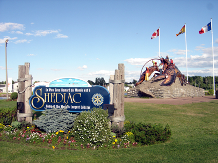 Entrée de la ville de Shediac, la capitale mondiale du homard (Nouveau-Brunswick, Canada). Photo personnelle prise en Aout 2005 Utilisateur : mj971